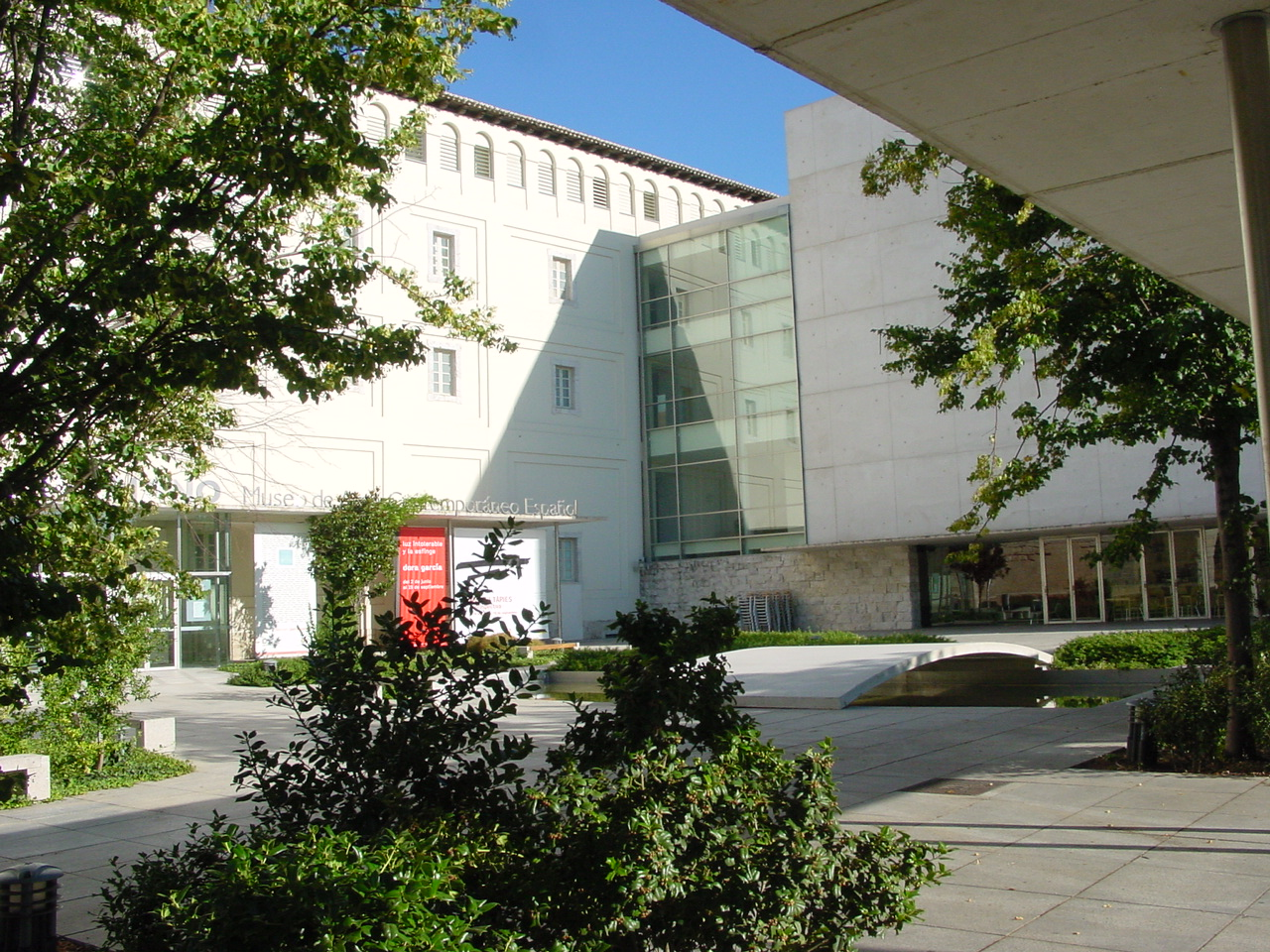 Museo de Arte Contemporáneo de Valladolid, España. Septiembre de 2005.